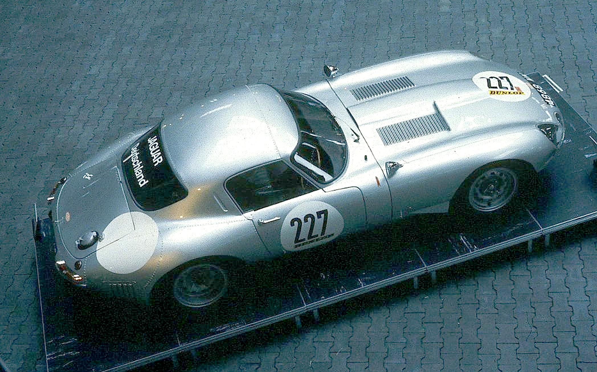 Jaguar E-Type „Lindner-Lightweight“ (wahrscheinlich Replikat von Lynx Motors) im Rennsportmuseum am Nürburgring